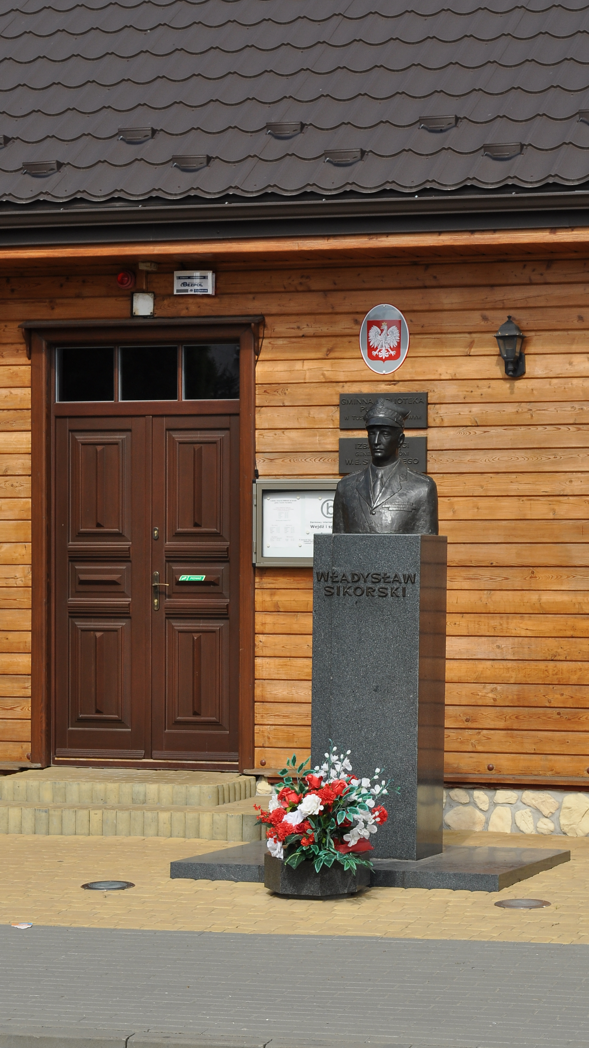 pomnik przed domem generała Władysława Sikorskiego w Tuszowie Narodowym